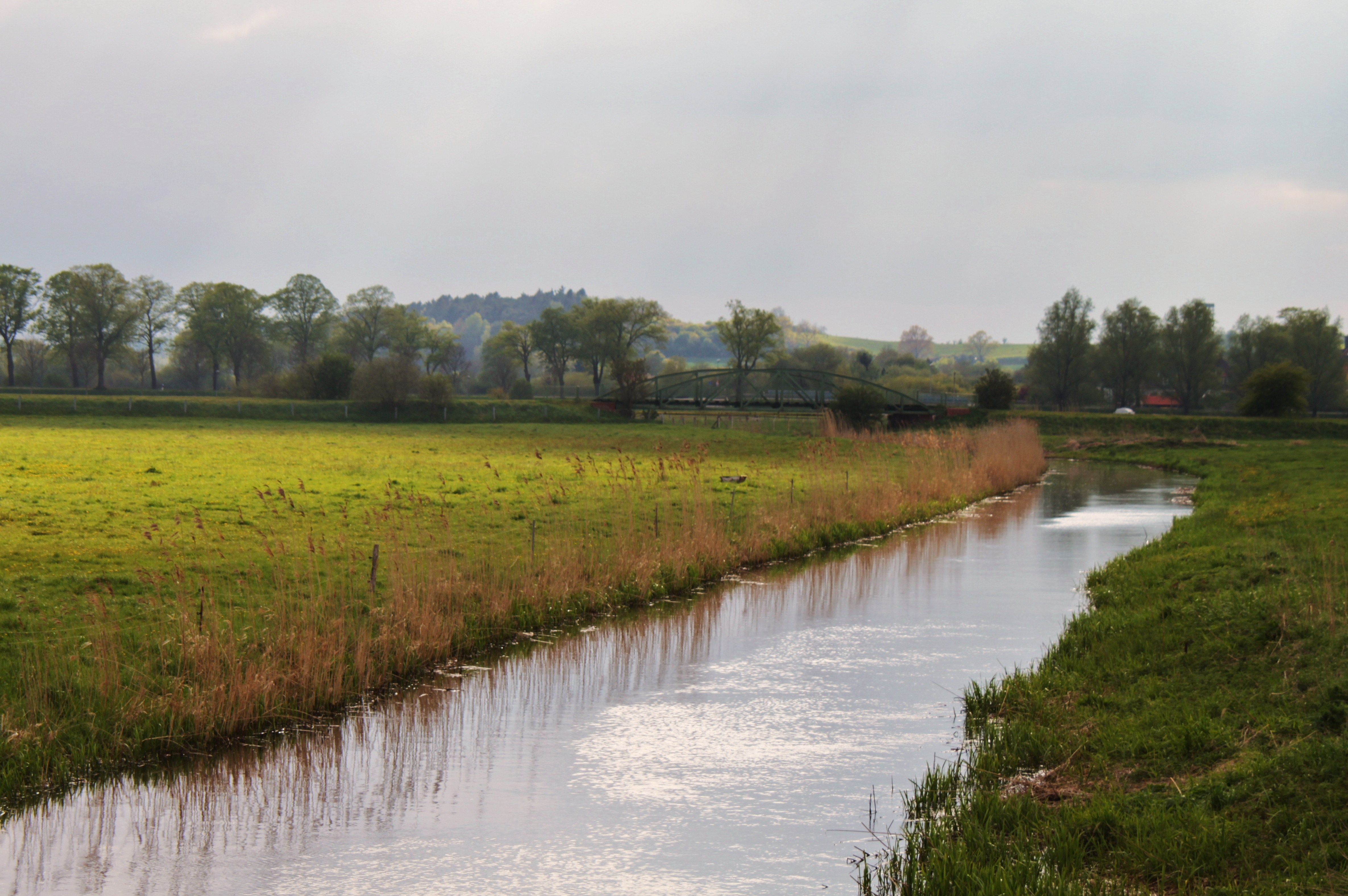 Blick vom Recknitzwehr „Vilz“ in Tessin entlang der Recknitz in südwestliche Richtung, alte Tessiner Bahnbrücke im Hintergrund; Bereich im FFH-Gebiet DE-1941-301 „Recknitz- und Trebeltal mit Zuflüssen“ in Mecklenburg-Vorpommern